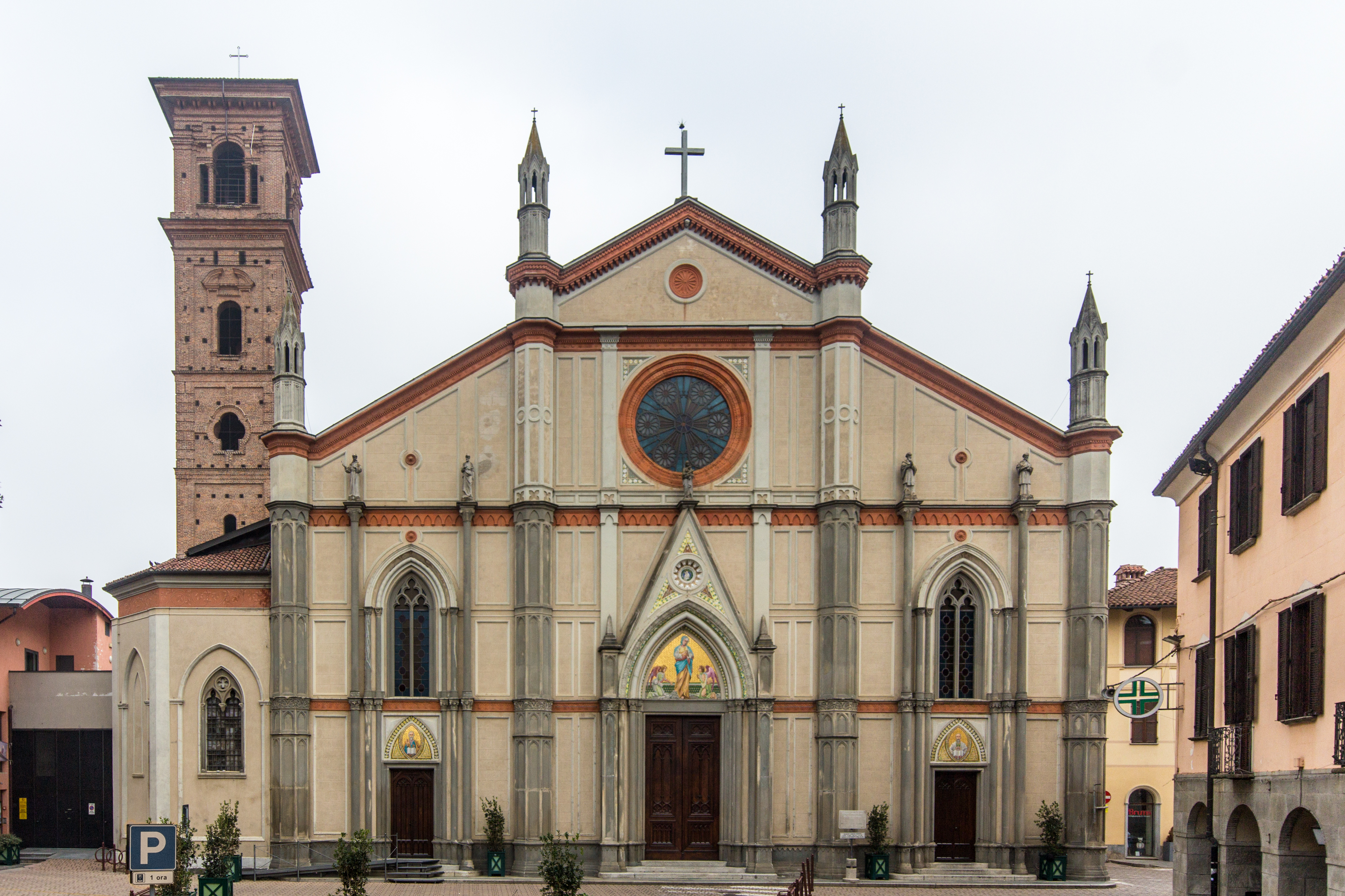 facciata della chiesa Collegiata dei SS Pietro e Paolo di Carmagnola